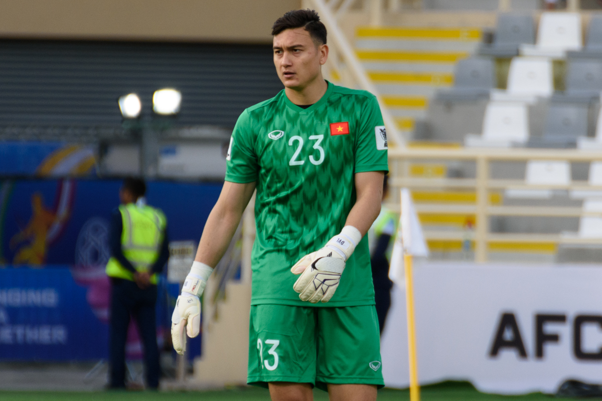 Đặng Văn Lâm at the Asian Cup 2019